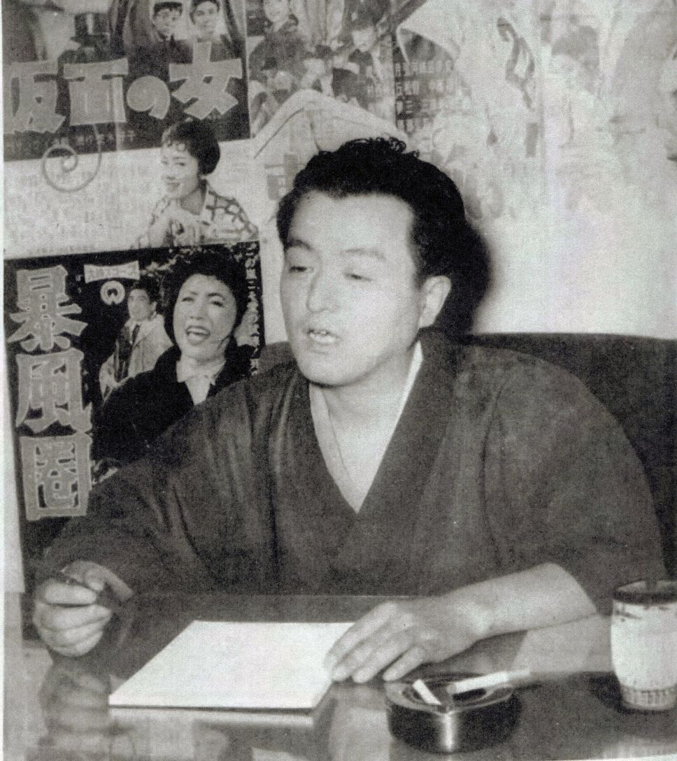 シナリオ作家協会『シナリオ』第15巻第10号(1959)より松浦健郎